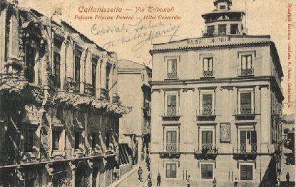 Hotel concordia via Matteotti già Salita tribunali a Caltanissetta